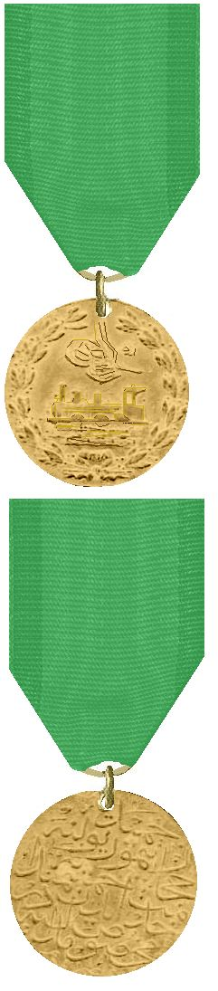 Turkse medaille Hadjuz spoorlijn 1912